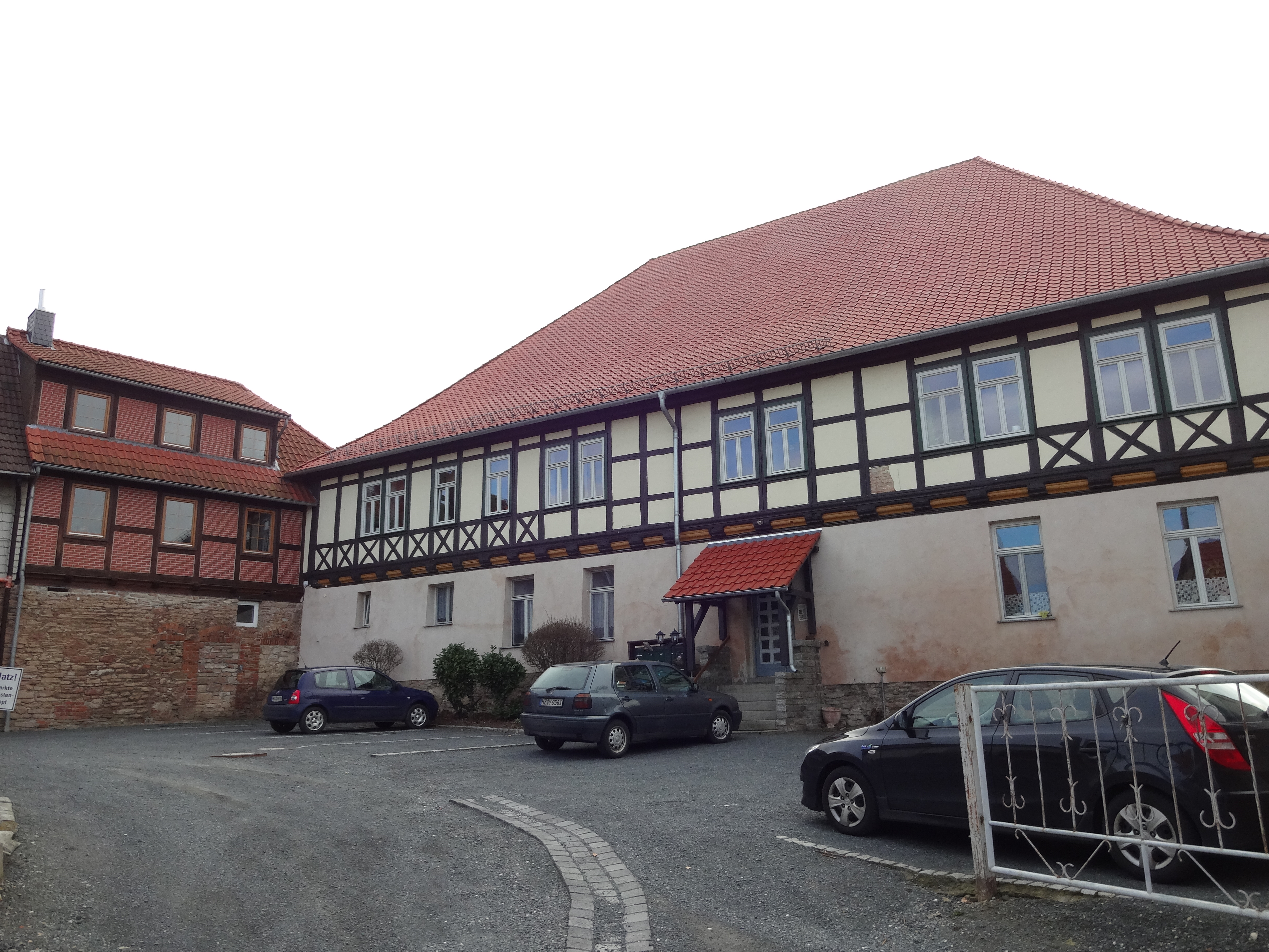 Denkmalgeschützter Adelshof im Oberhof 8 in Benzingerode (Ortsteil von Wernigerode)